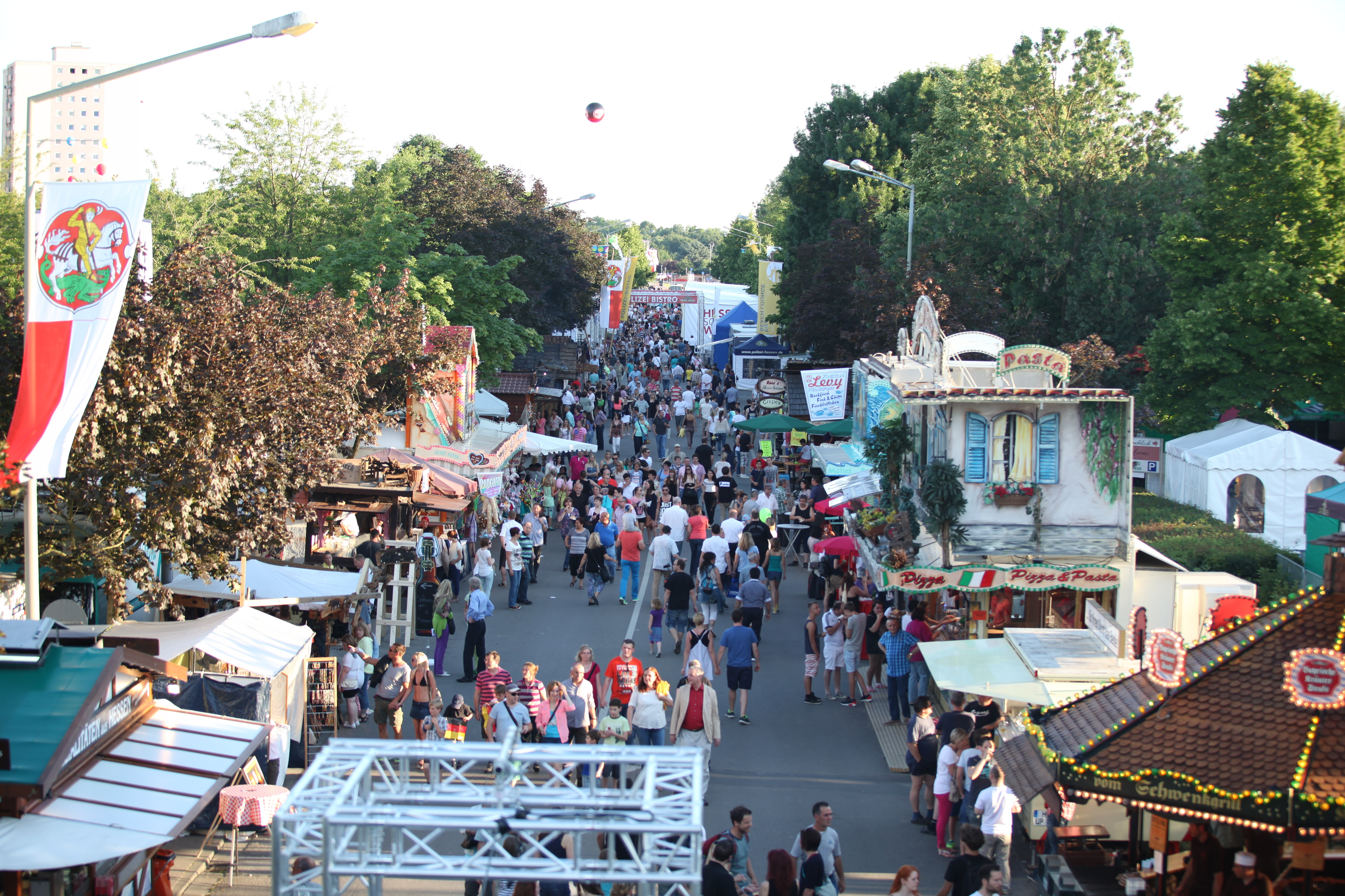 Die Festmeile beim Hessentag 2014 in Bensheim am 6. Juni 2014.